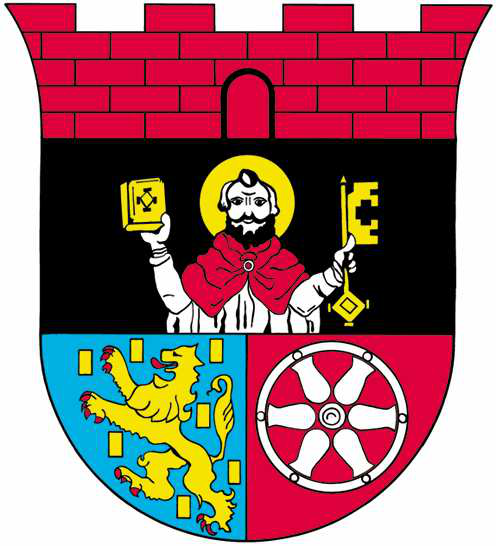 Wappen von Hofheim_am_Taunus